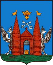 Altes Wappen der Stadt Riga